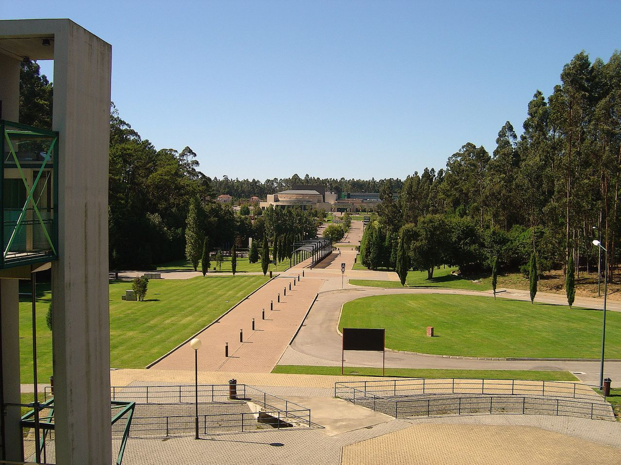 The congress centre Europarque, at Santa Maria da Feira, Portugal.